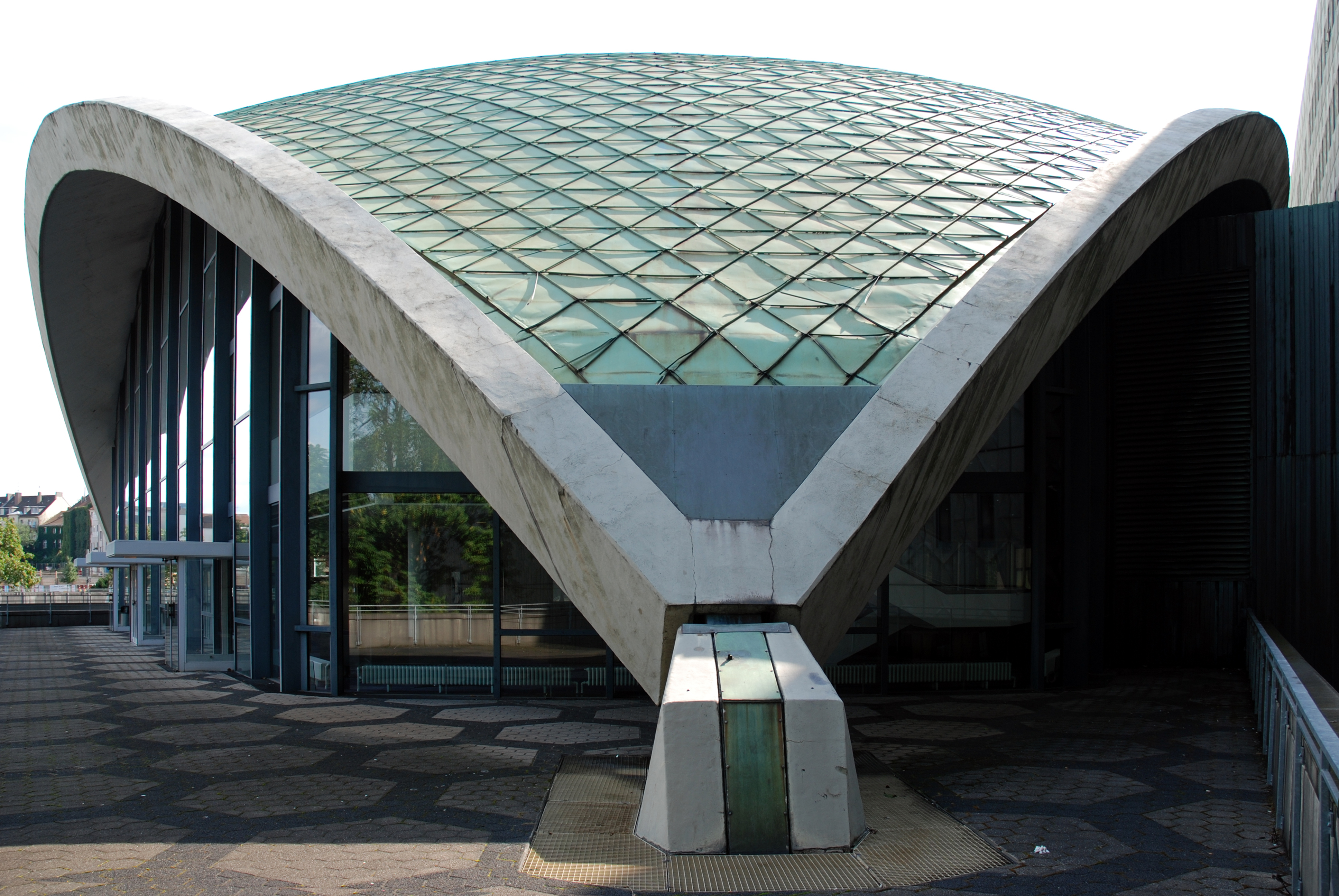 Dortmund, Städtische Bühnen, Stadttheater, Oper, Betonkuppel über Zuschauerraum, nördliche Ecke am Bühnenhaus, Betonschäden